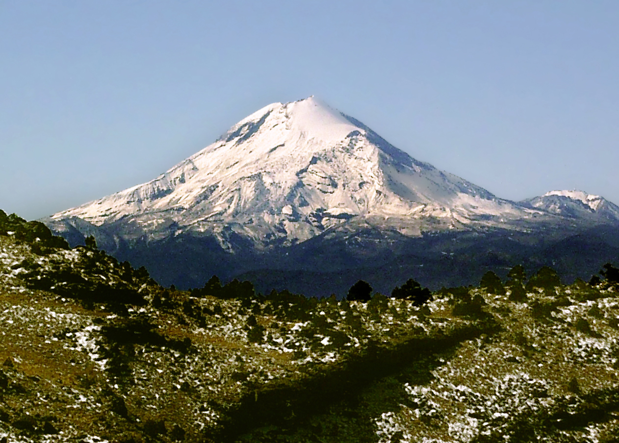 Pico de Orizaba y los Eje Neovolcánico — visto desde el Cofre de Perote. Nevada del 23 de Febrero del 2009, fotos del 24 de Febrero del 2009..